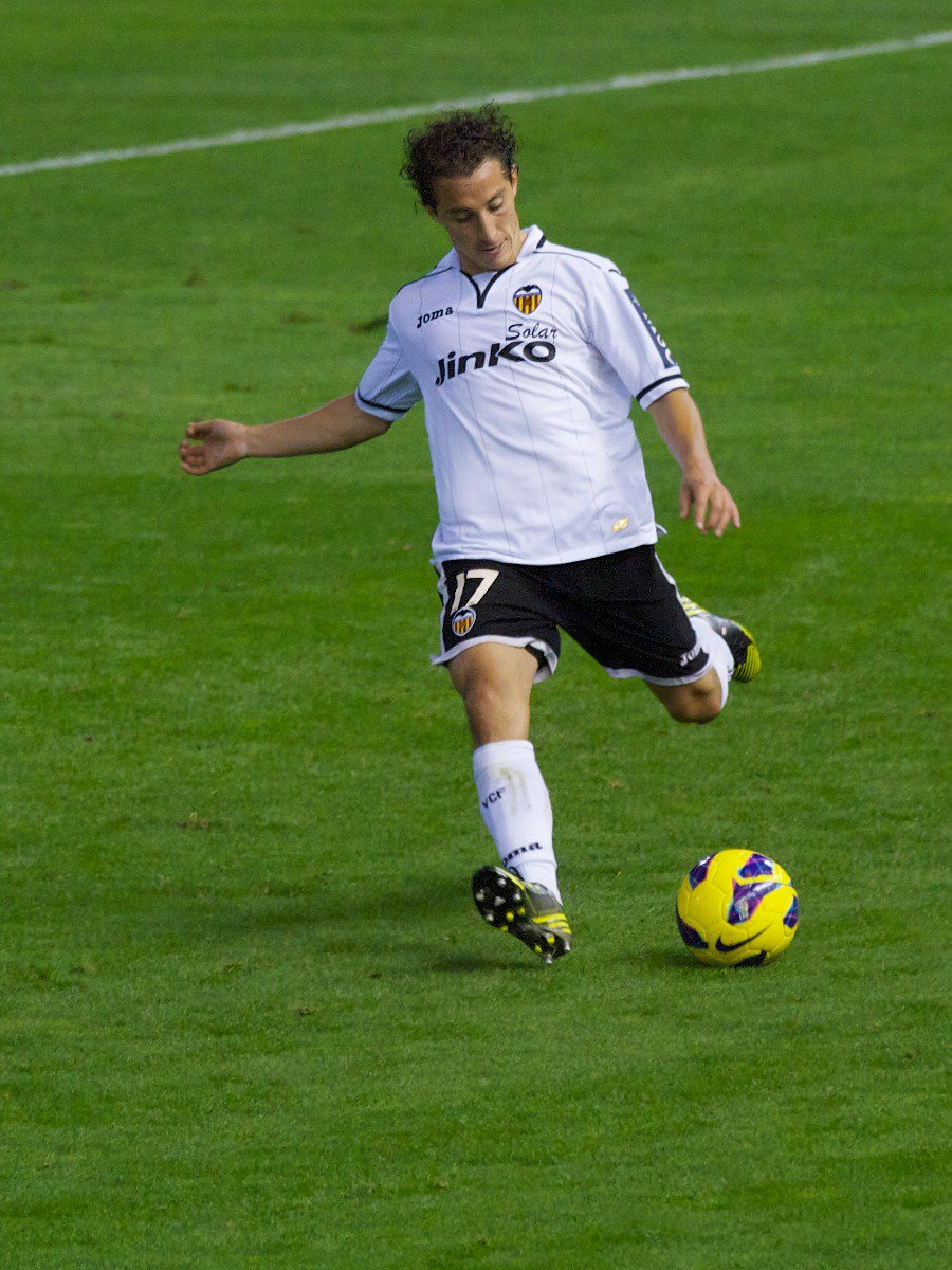 El jugador merengot Andrés Guardado